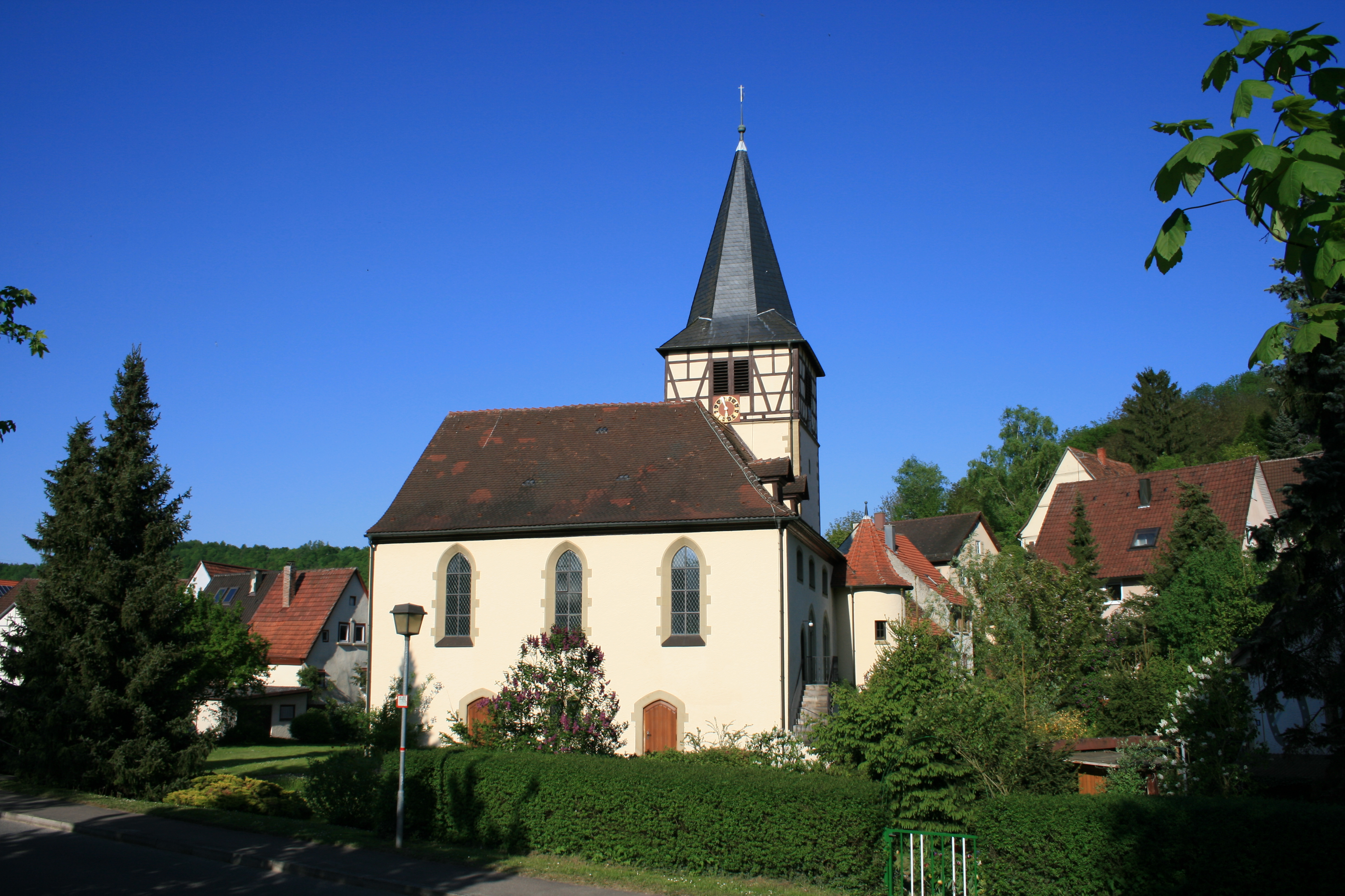 Die evangelische Kirche im Öhringer Stadtteil Ohrnberg